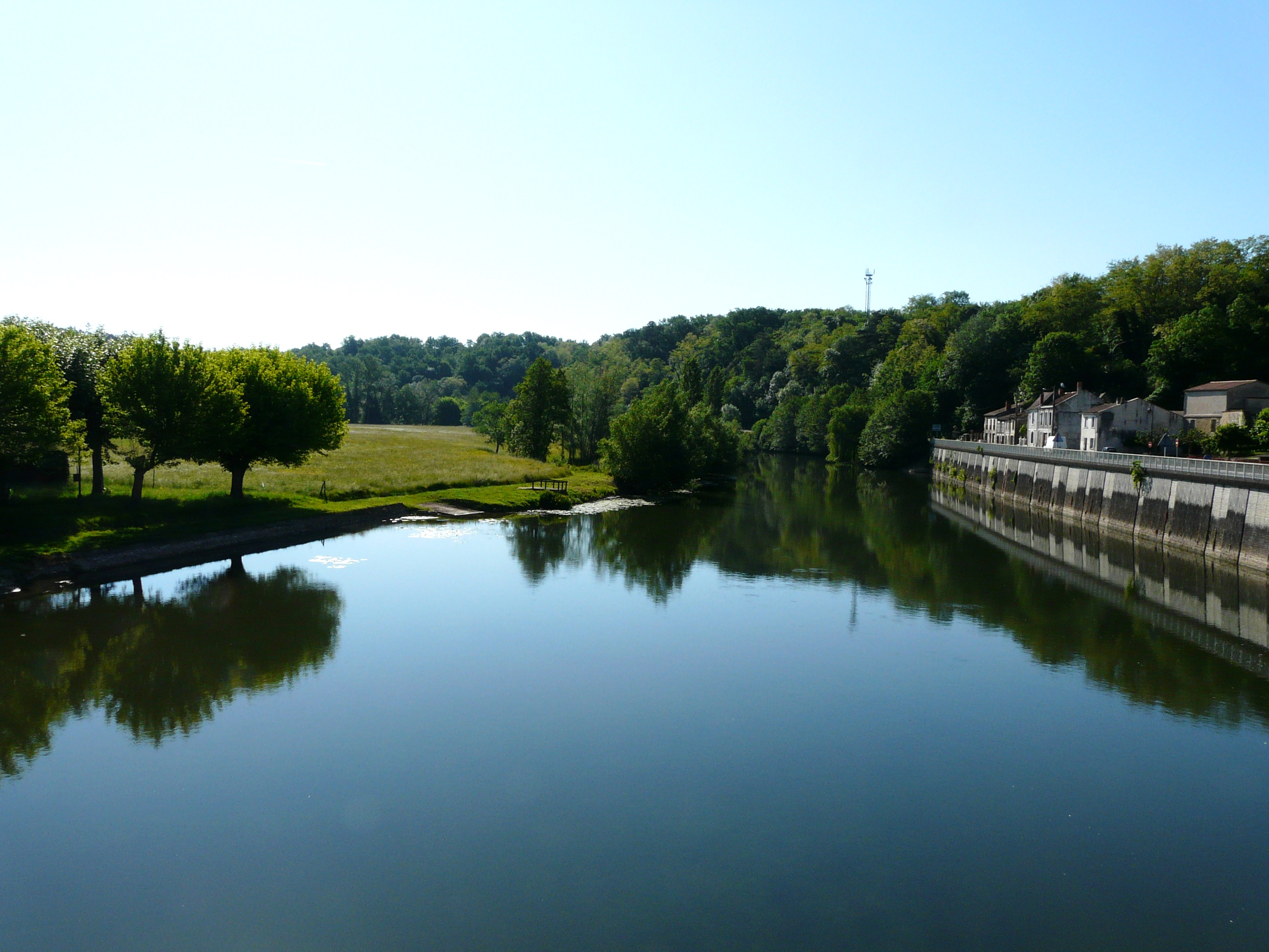 En amont du pont de la route départementale 709, l'Isle marque la limite entre Saint-Front-de-Pradoux (à gauche) et Mussidan (à droite), Dordogne, France.